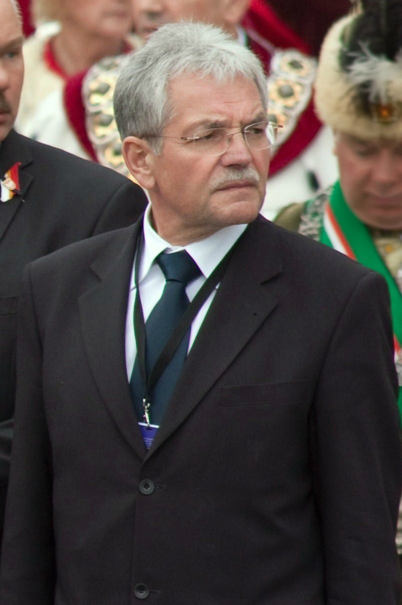 Stanisław Kracik, polityk i samorządowiec.